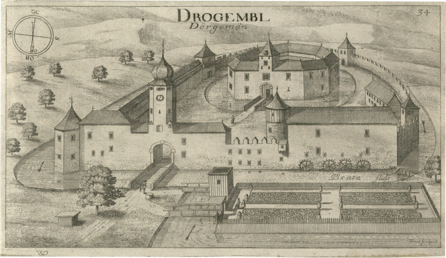 Grad Dragomelj (Drogembl)